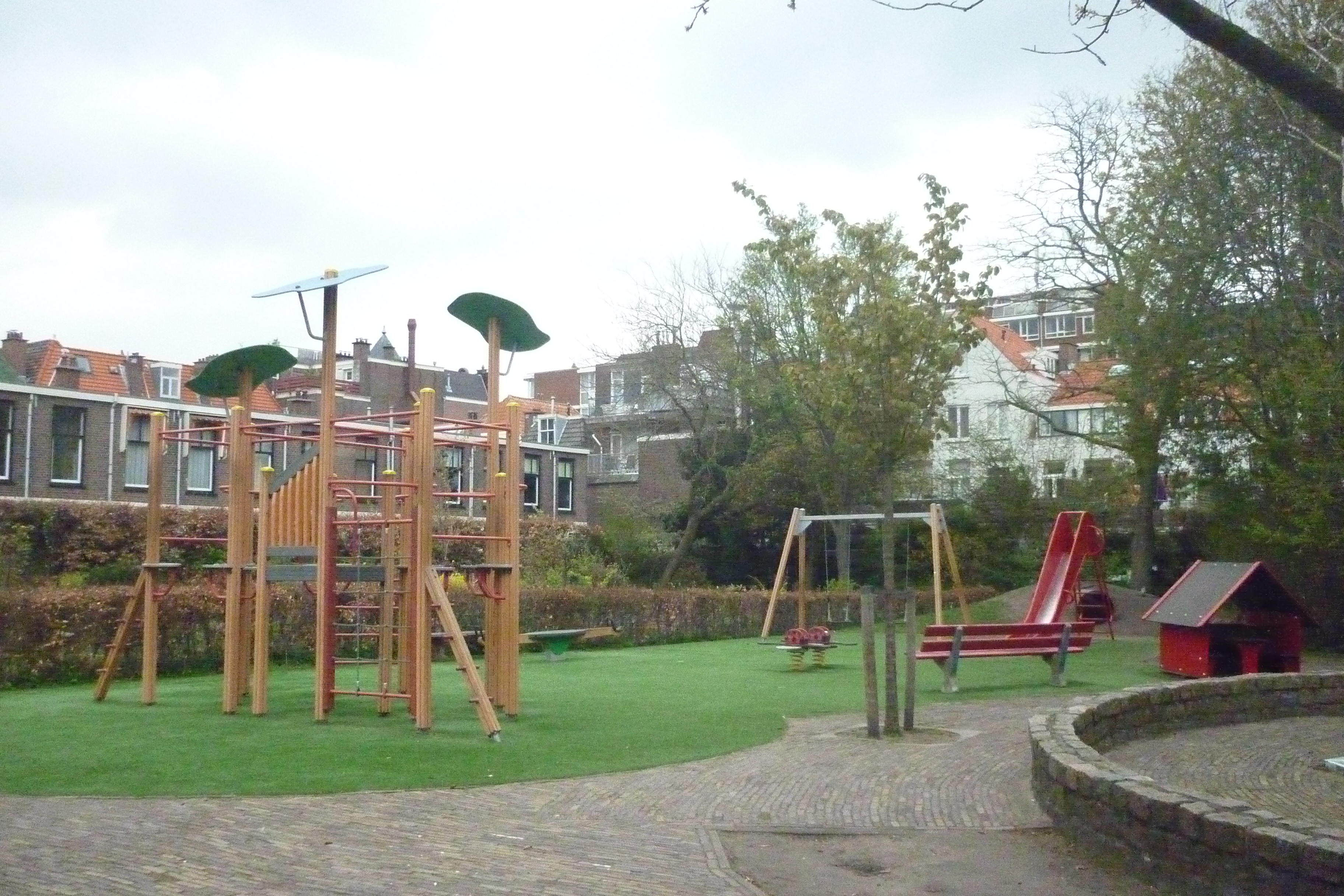 Cantaloupenburg speelpark